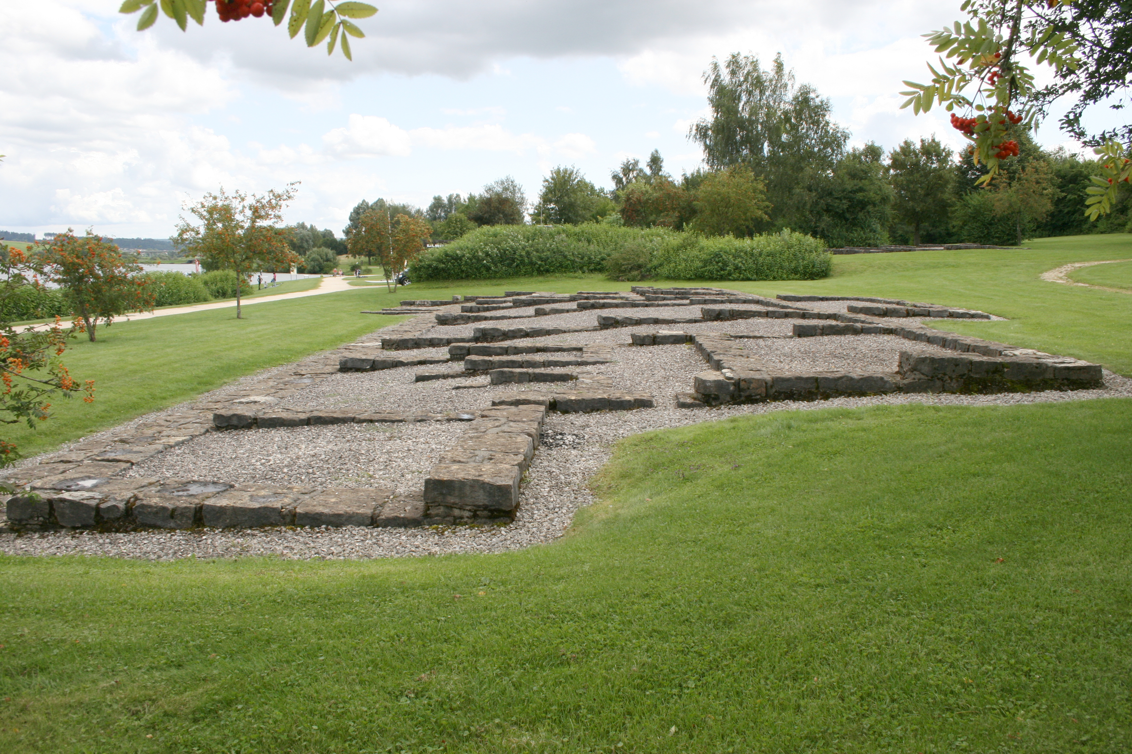 Rekonstruierte Grundmauern eines Vicus-Gebäudes vom Kastell Buch.